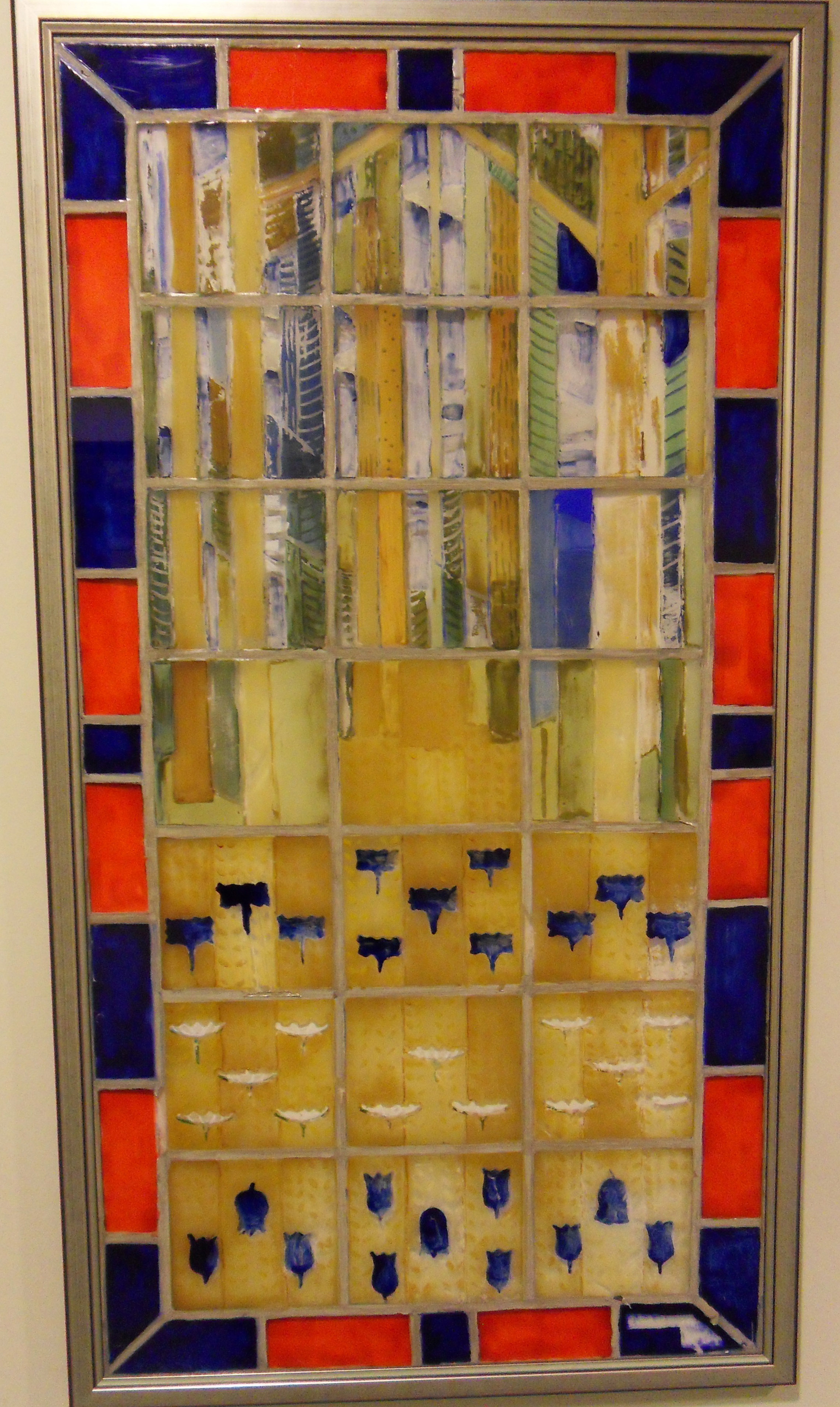 Vägg dekoration i Färila